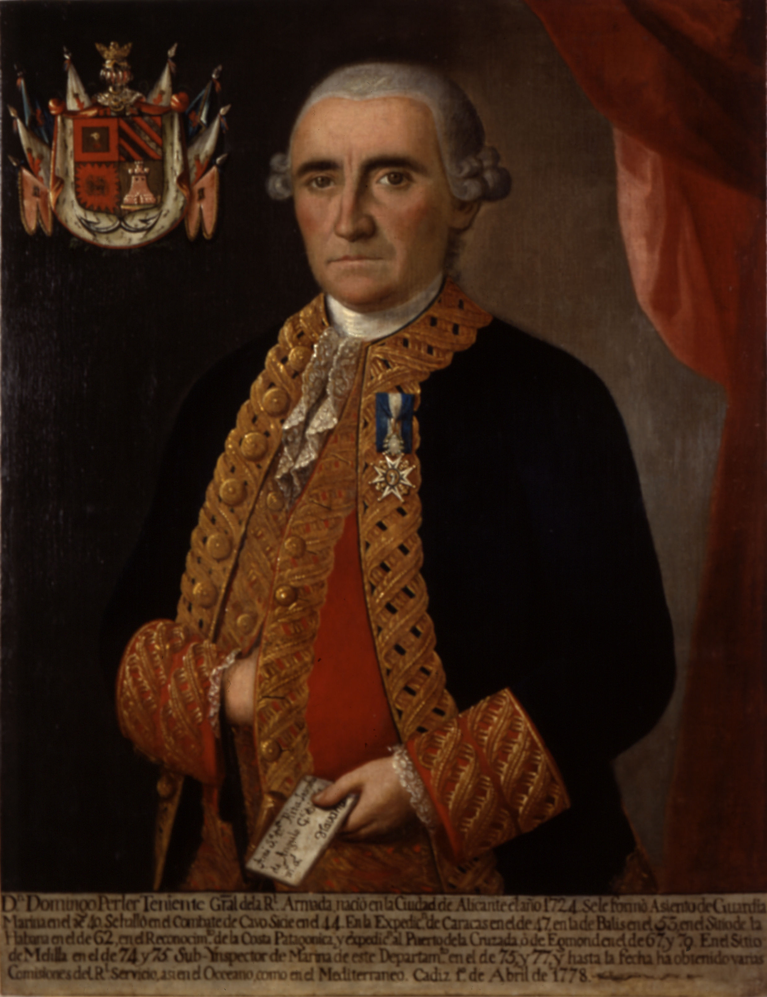 Portrait of Retrato del marino español Domingo Perler (1724-1800)